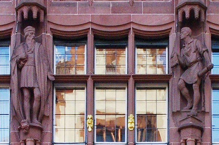 Gutenberg-Gruppe von Friedrich Meinecke am alten Haus der Freiburger Zeitung